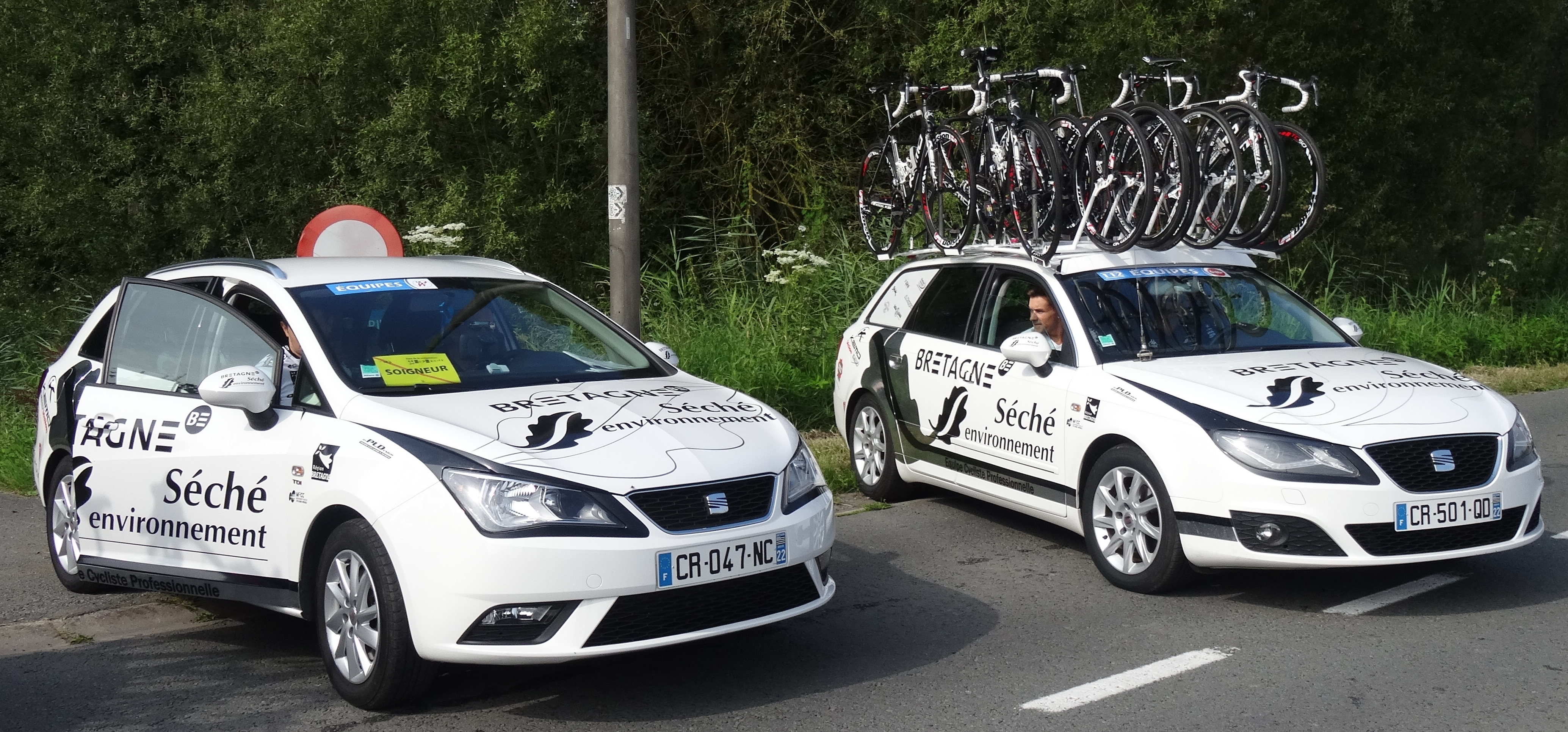 Reportage photographique réalisé le dimanche 27 juillet à l'occasion du départ de la deuxième étape du Tour de Wallonie 2014 à Péronnes-lez-Antoing (Antoing), Belgique.